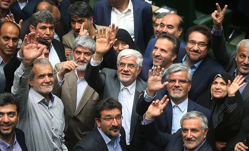 انتخابات هیئت‌ رئیسه دائم مجلس دهم ایران